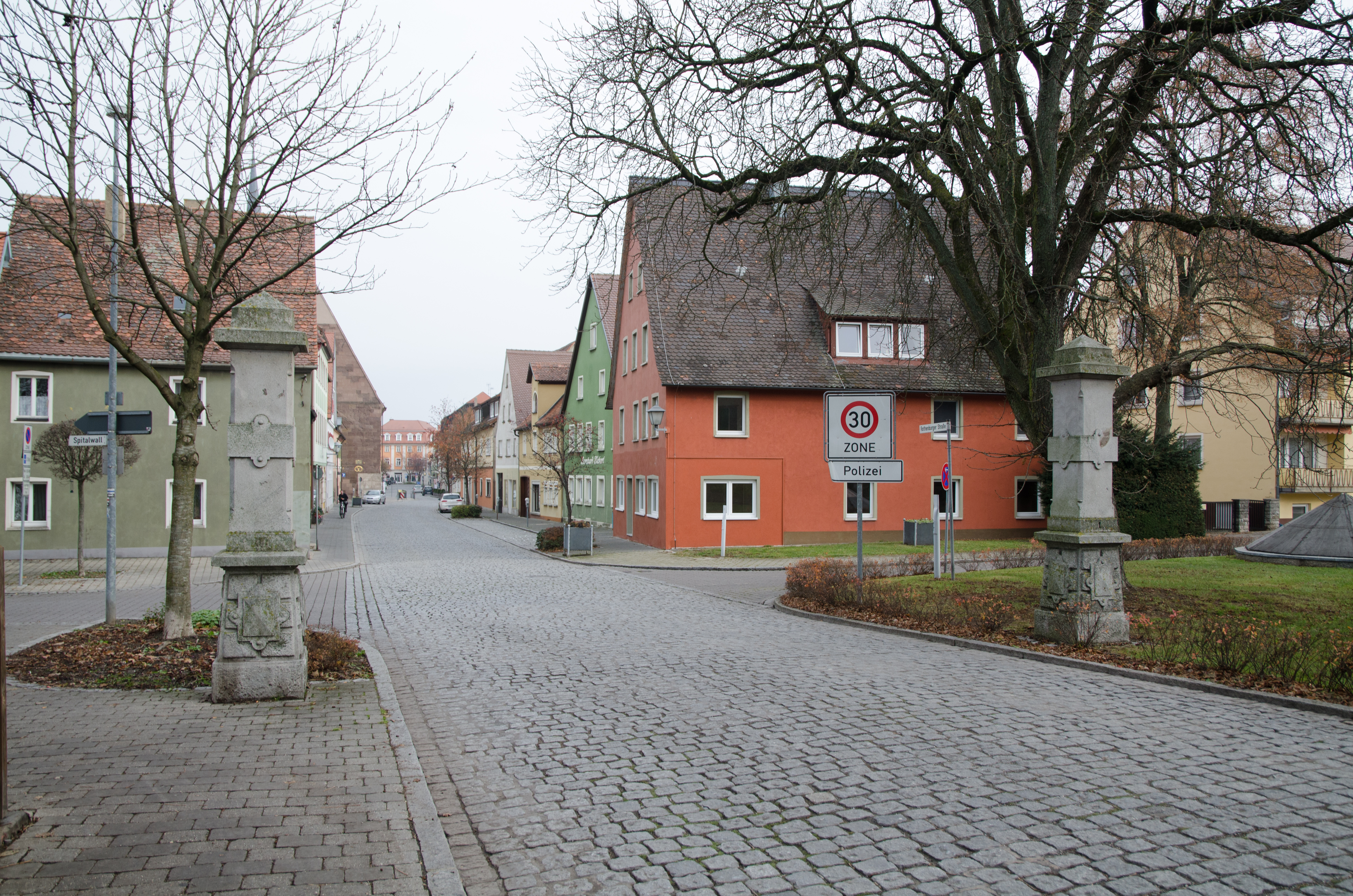 Bad Windsheim, Rothenburger Straße, Torpfeiler